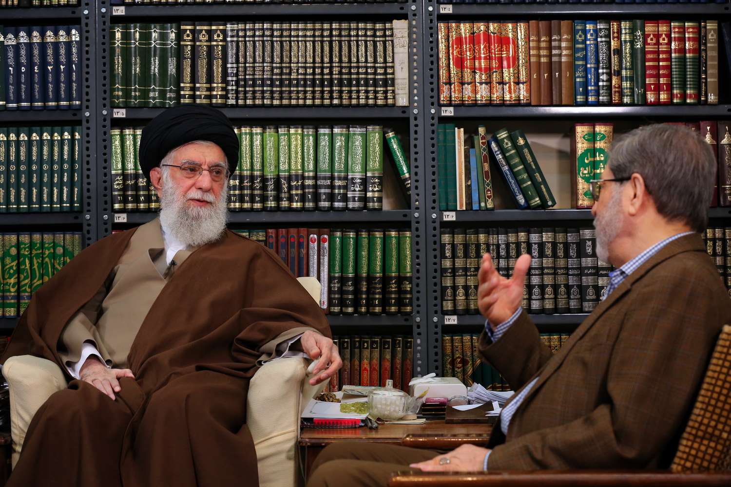 پیام تشکر از زحمات پزشکان و پرستاران در مبارزه با کرونا